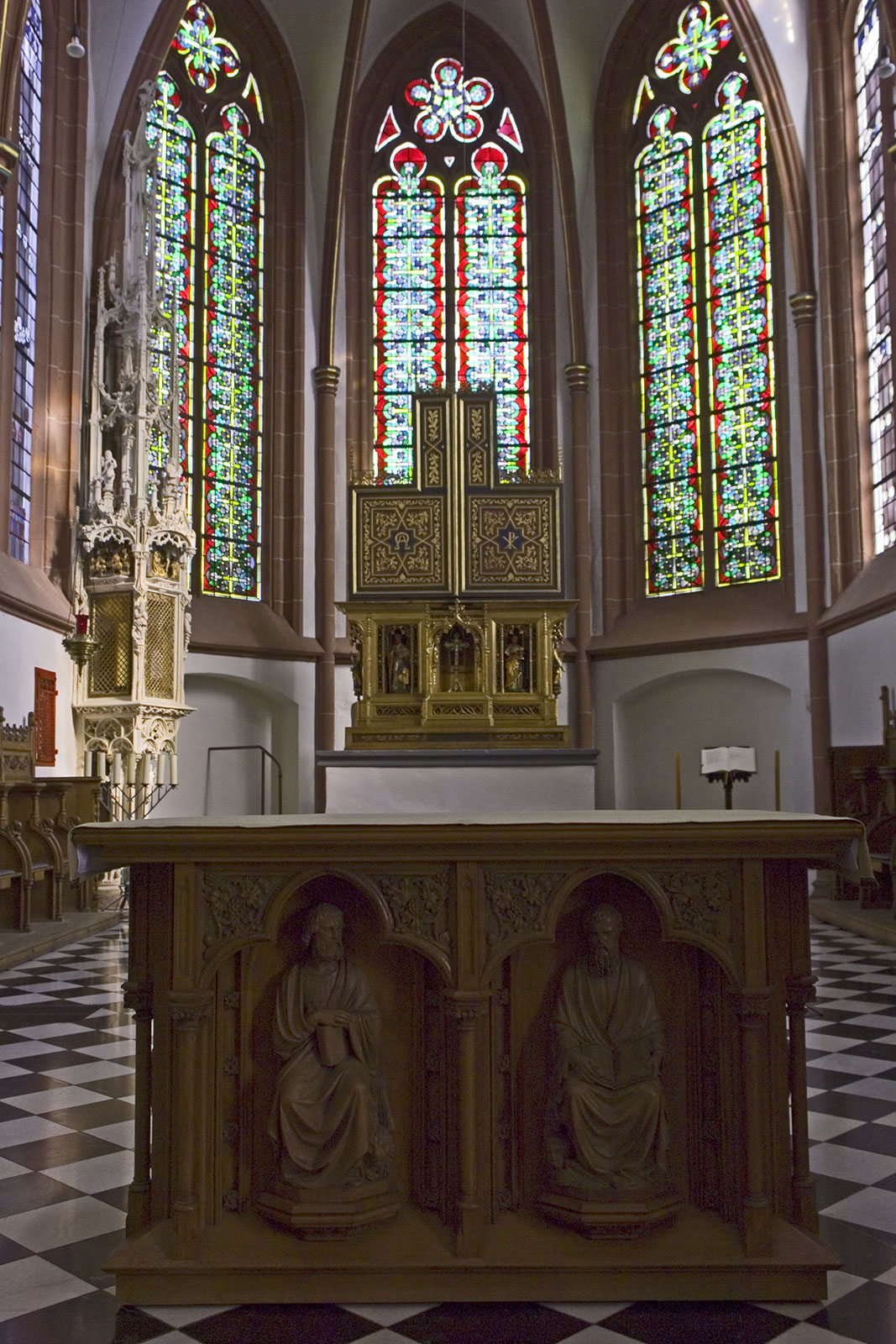 Euskirchen, St. Martin, Altarraum